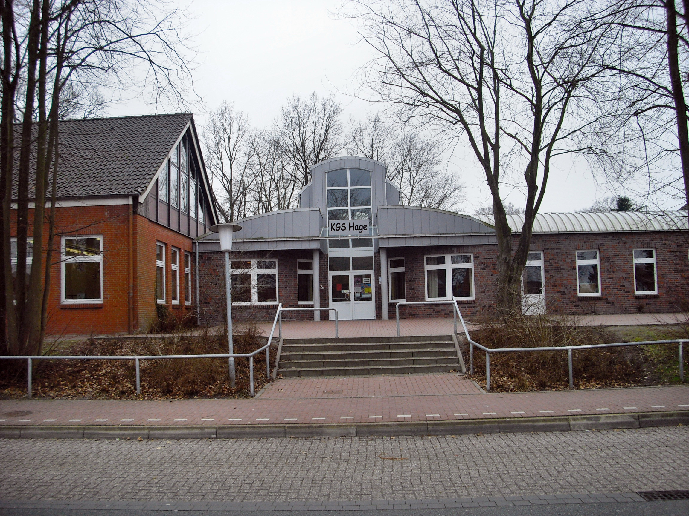 School Hage (East Frisia), Germany